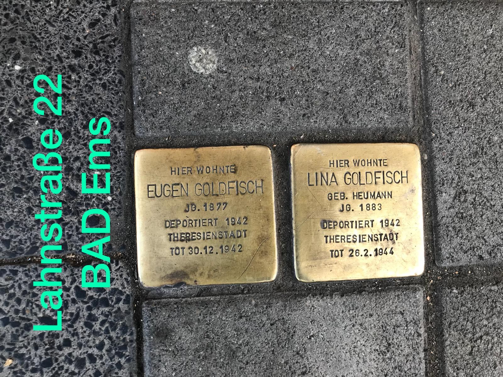 Stolperstein Lahnstraße 22 in Bad Ems